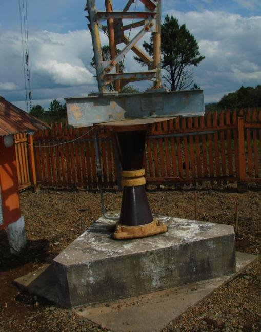 Base da torre de uma Ionosonda. Freqüência - 32 KHz - Potência 1.300.000 W